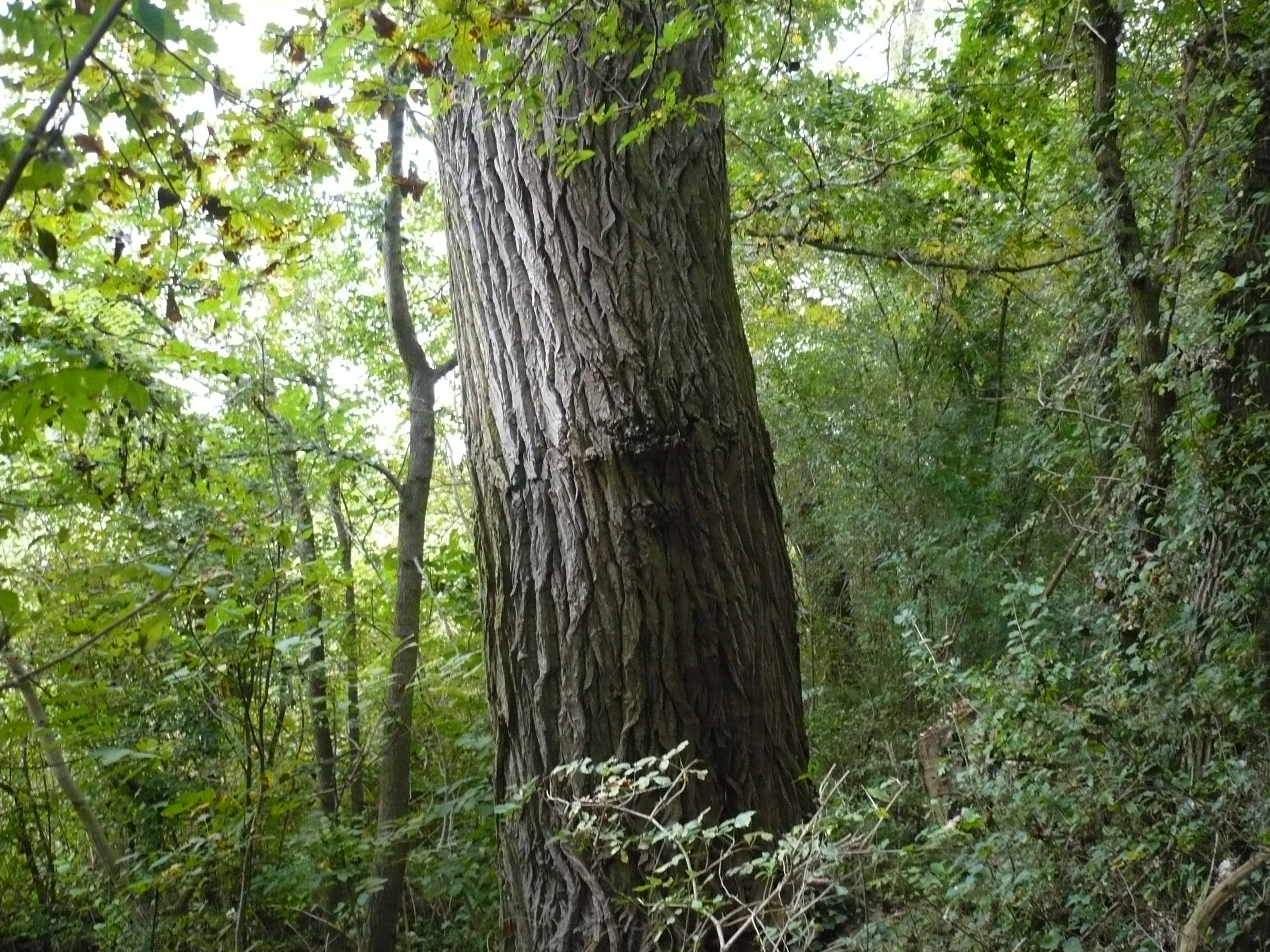 Fekete nyár Bezdánnál (Szerbia)